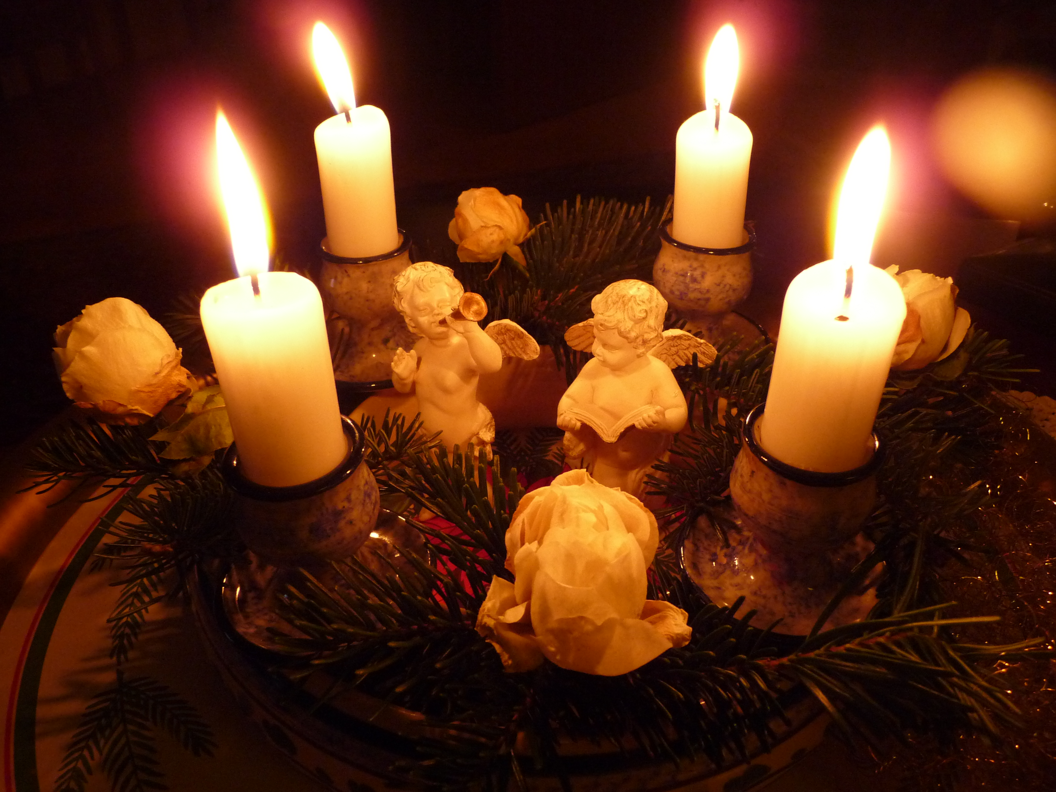 Adventskranz mit vier Kerzenleuchtern mit einer Steckschale aus Porzellan, die mit Blüten und Zweigen geschmückt werden kann. In der Mitte zwei Putten.